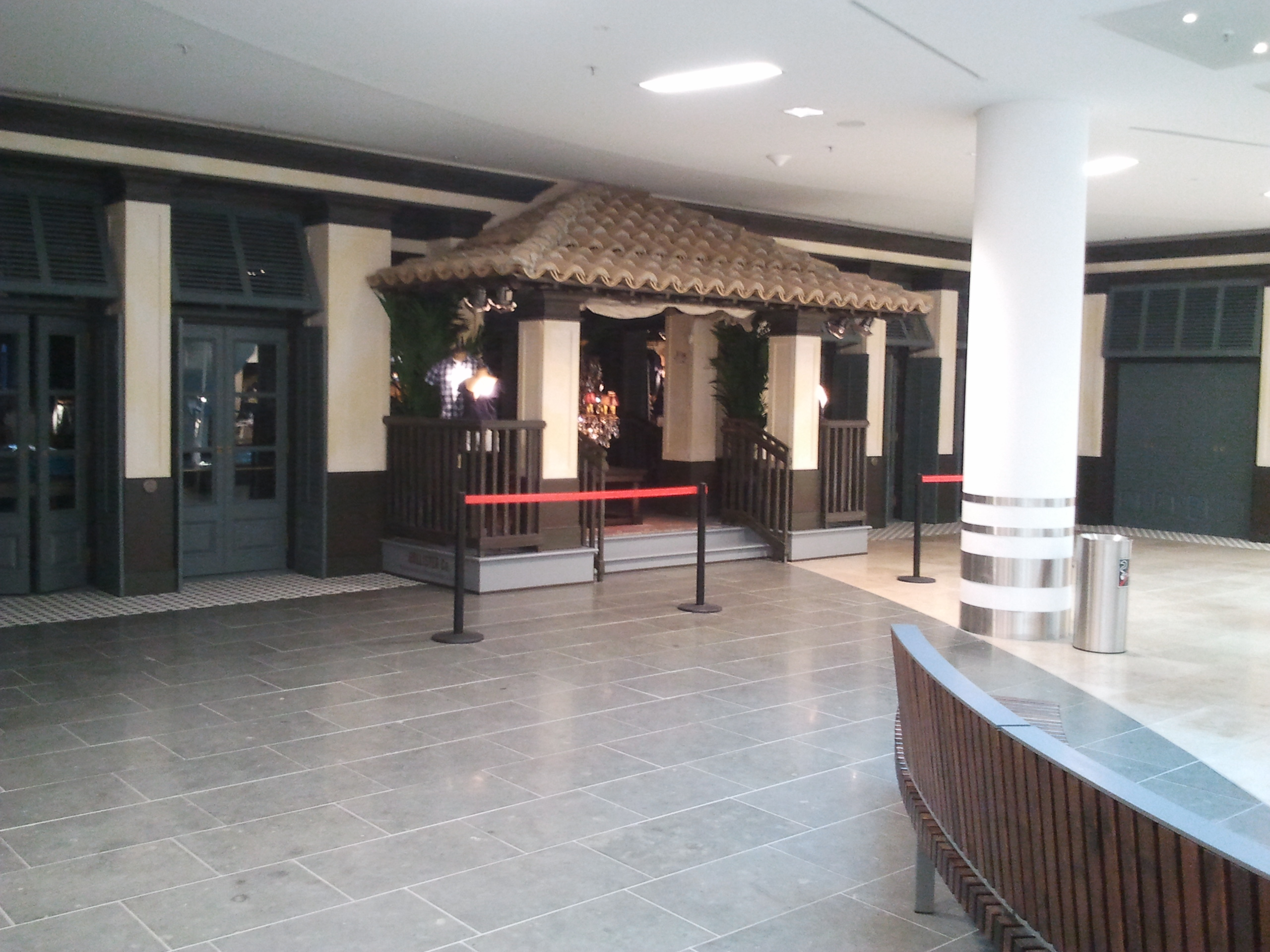 Hollister Store in Rheinparkcenter, Neuss, Germany